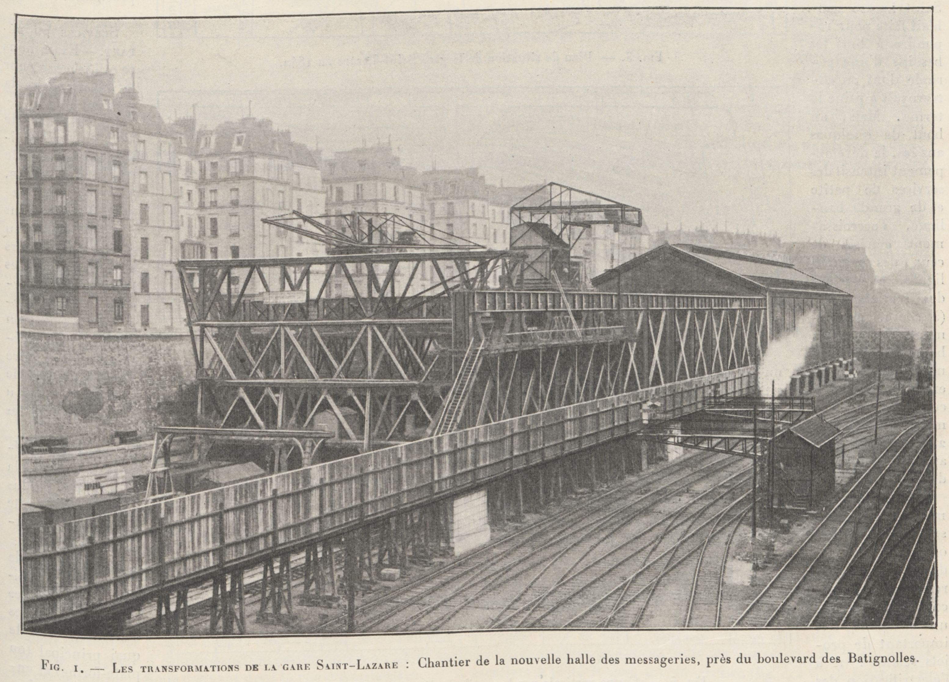 Messageries du pont de l'Europe : travaux de construction de la nouvelle halle.